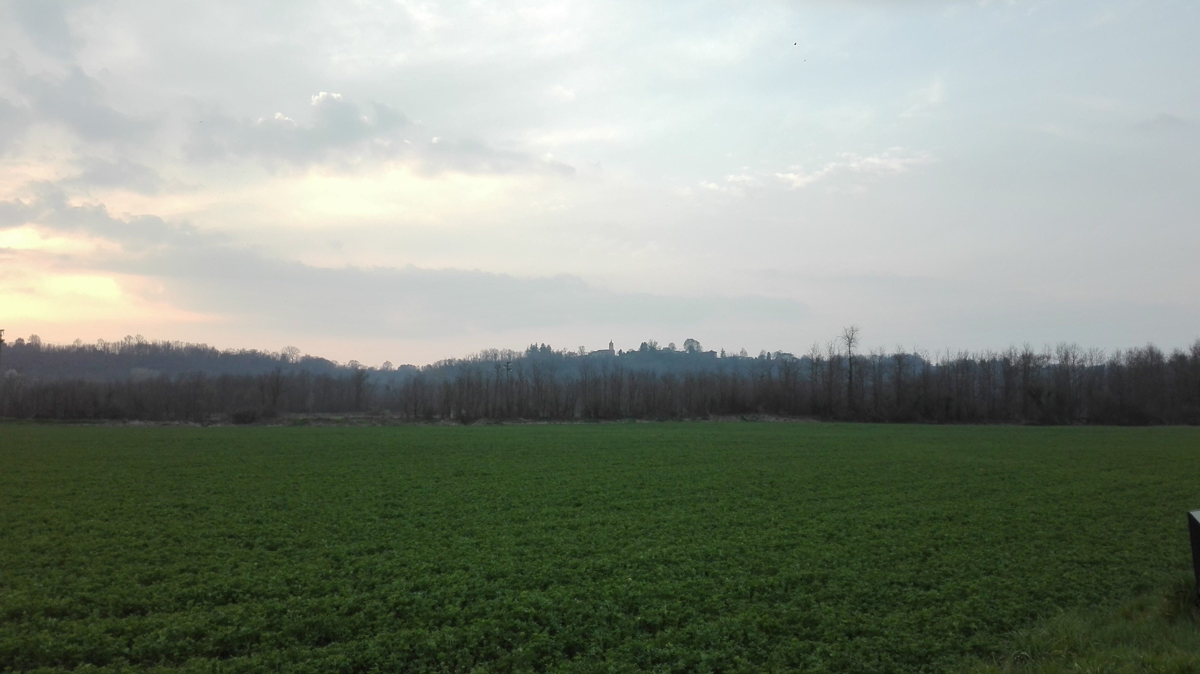 Collie di Pombia visti dalla Valle del Ticino